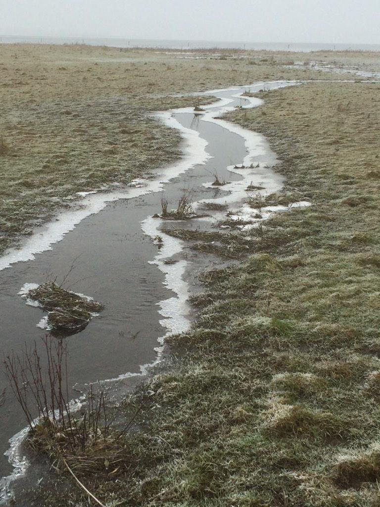 Het beekje de Blaffert vlakbij de monding in het Markiezaatsmeer